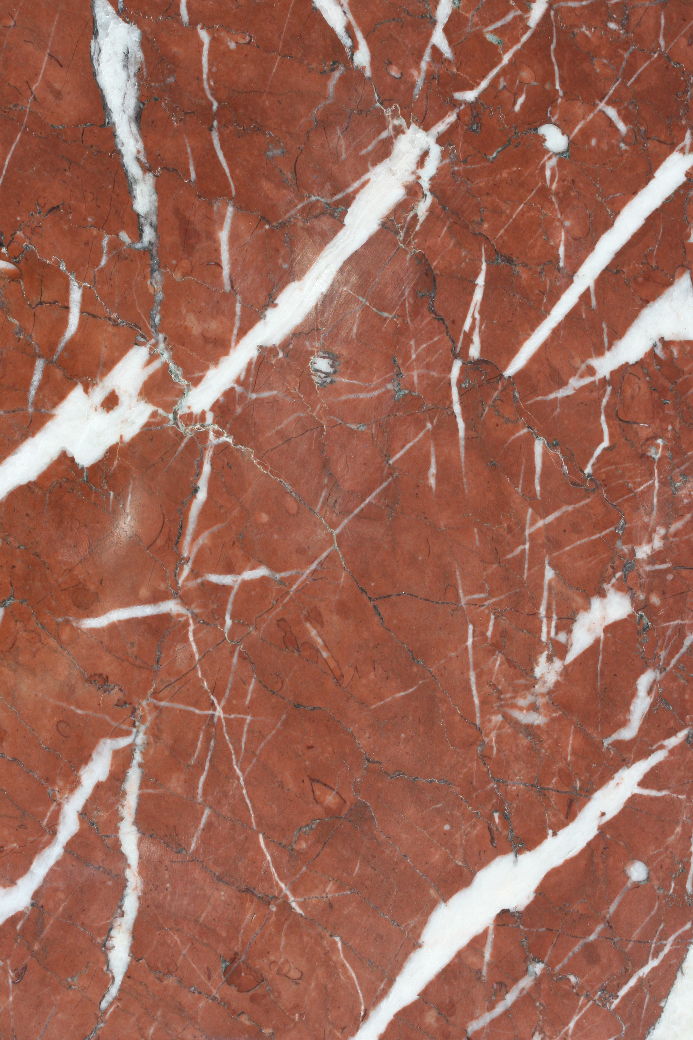 Saalburger Marmor, 23 x 14 cm (Kalkstein des Oberdevons)